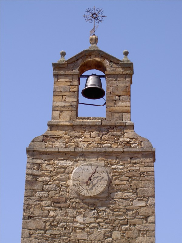 Espadaña y Reloj - Torre del Reloj (Carrascosa de la Sierra, Soria)